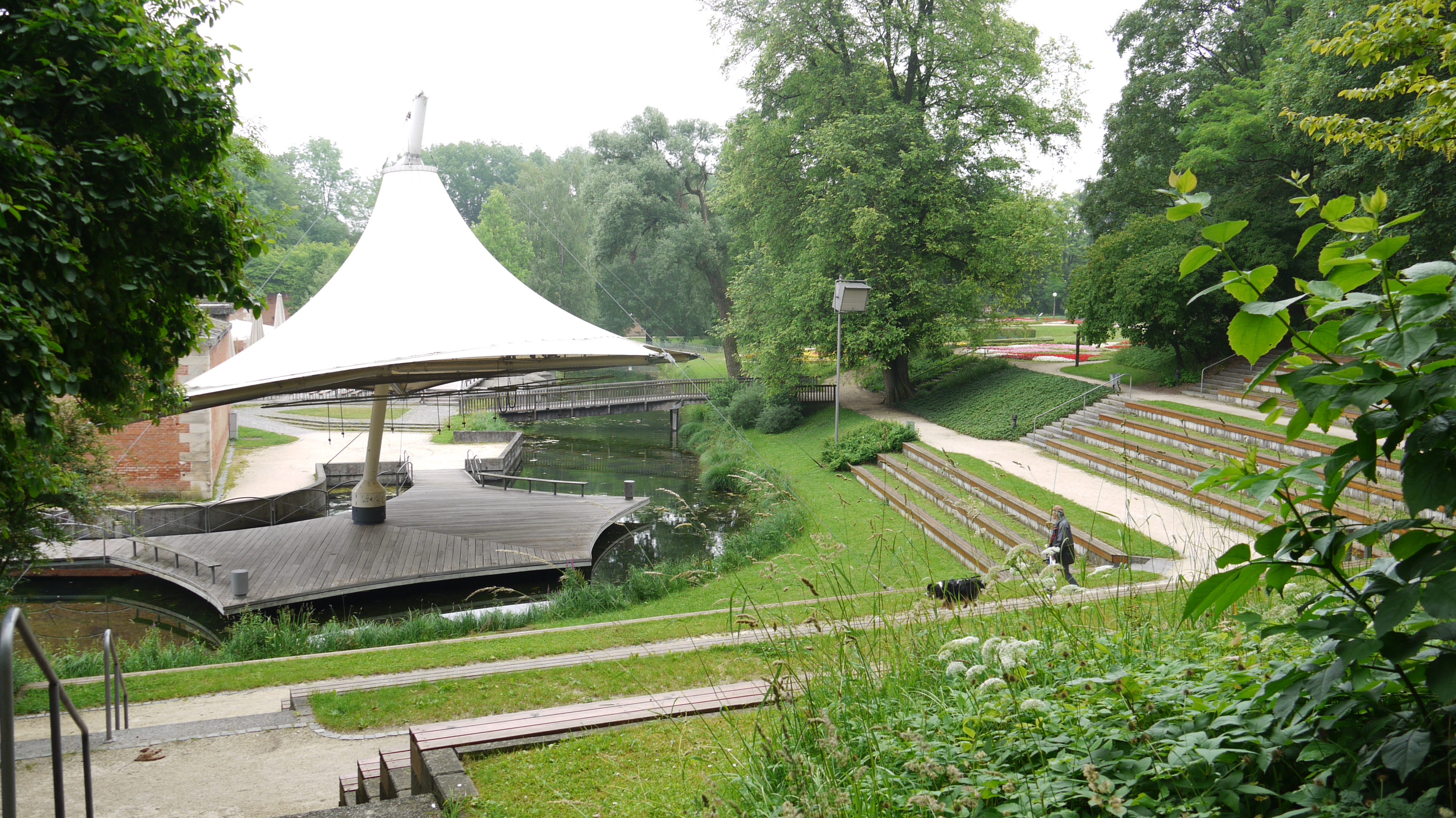 Die Veranstaltungsbühne im Glacis Neu-Ulm